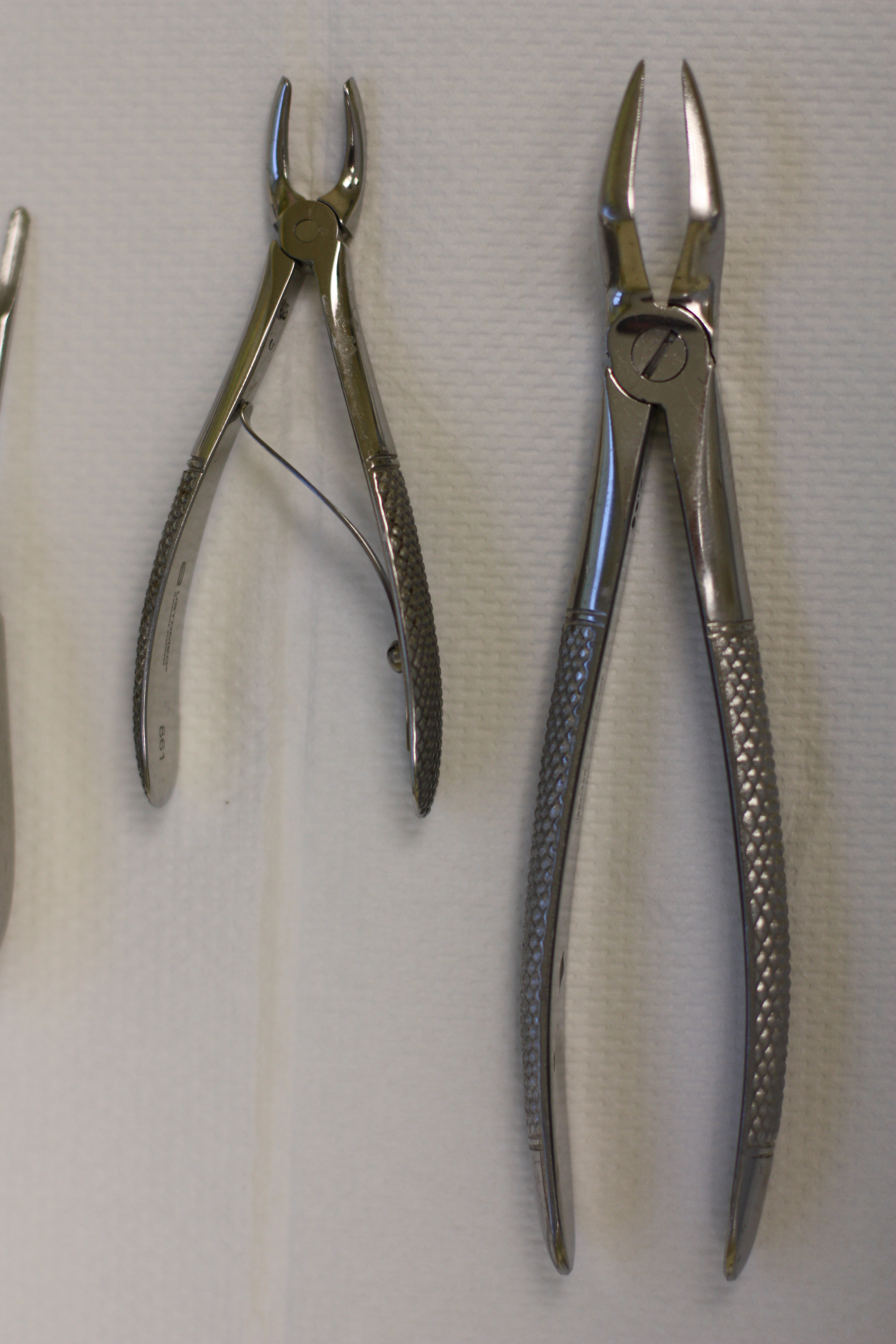 Extraktionszangen für Oberkiefer; rechts große Zange für Erwachsene, links kleine Zange für Milchzähne